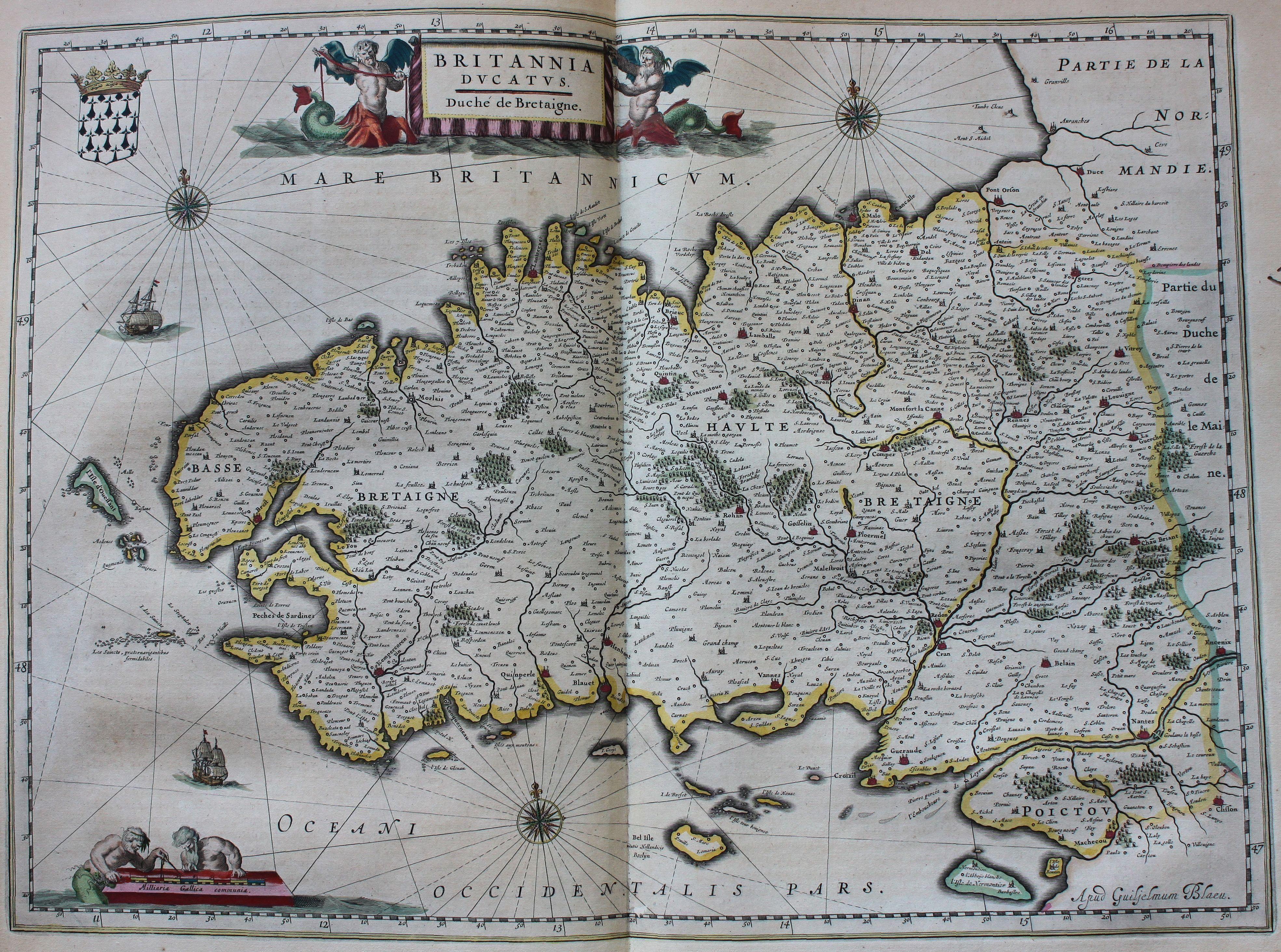 Descripción bibliográfica: Geographia Blaviana. - [Amsterdam : Juan Blaeu, 1659] . - [32], VI, 96 p., 34 f., h. 35a, 35b, 35c, 35d, 36-44 f., 34, [2], 36-40, [2], 43-70 [i. e. 75], [1] f., [20] p. de map., [9] f. de map., [4] f. pleg. de map., [2] f. de plan., [2] f. ge grab. : |bil. ; |cFol. marca major (57 cm.) . - En la dedicatoria a Felipe IV: "Presenta ... El Atlas Universal y Cosmographico de los orbes y terrestre ... Juan Blaeu" . - Título tomado del frontispicio. -- Privilegio fechado en 1659. -Errores de pag. - Sign.: 1, *2, **3, ***-****2, a-e2, A-I2, K1, L-Z2, Aa-Dd2, 4 2, Ee-Ff2, A-I2, K1, L2, M1, N-Y2, Z5, Aa-Dd2, Ee1, A-D2, E-F1, G-I2, K-L1, M-O2, P1, Q-Z2, Aa-Bb2, Cc1, Dd3, Ff-Zz2, Aaa-Bbb2, . - Frontispicio grab. col. -- Incluye un total de 49 il. entre map., plan. i grab. Materia: Atlas - Obras anteriores a 1800 Impresor: Blaeu, Joan, 1596-1673, imp. Lugar de impresión: Holanda. Amsterdam Localización: Vea la ilustración en su contexto Visite también la exposición "Cartografía histórica en la Biblioteca de la Universidad de Sevilla"